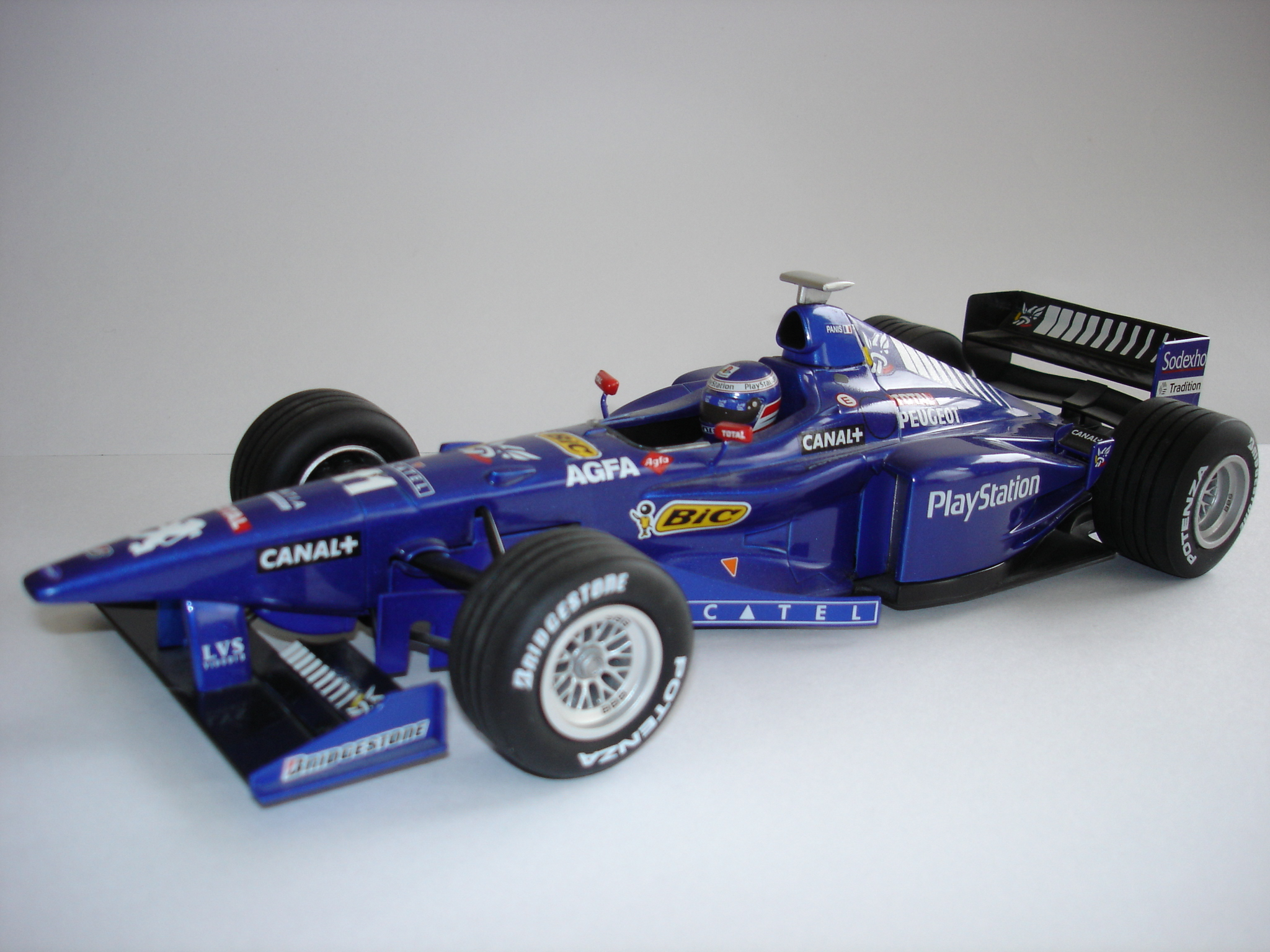 Prost AP 01 model car